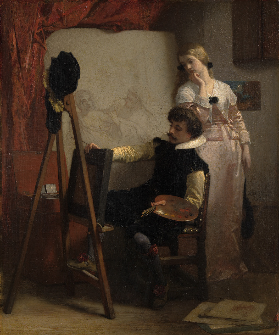 schilderij; schilderkunst; ambachten en beroepen; kunst en kunstenaars; genre; kunstschilder